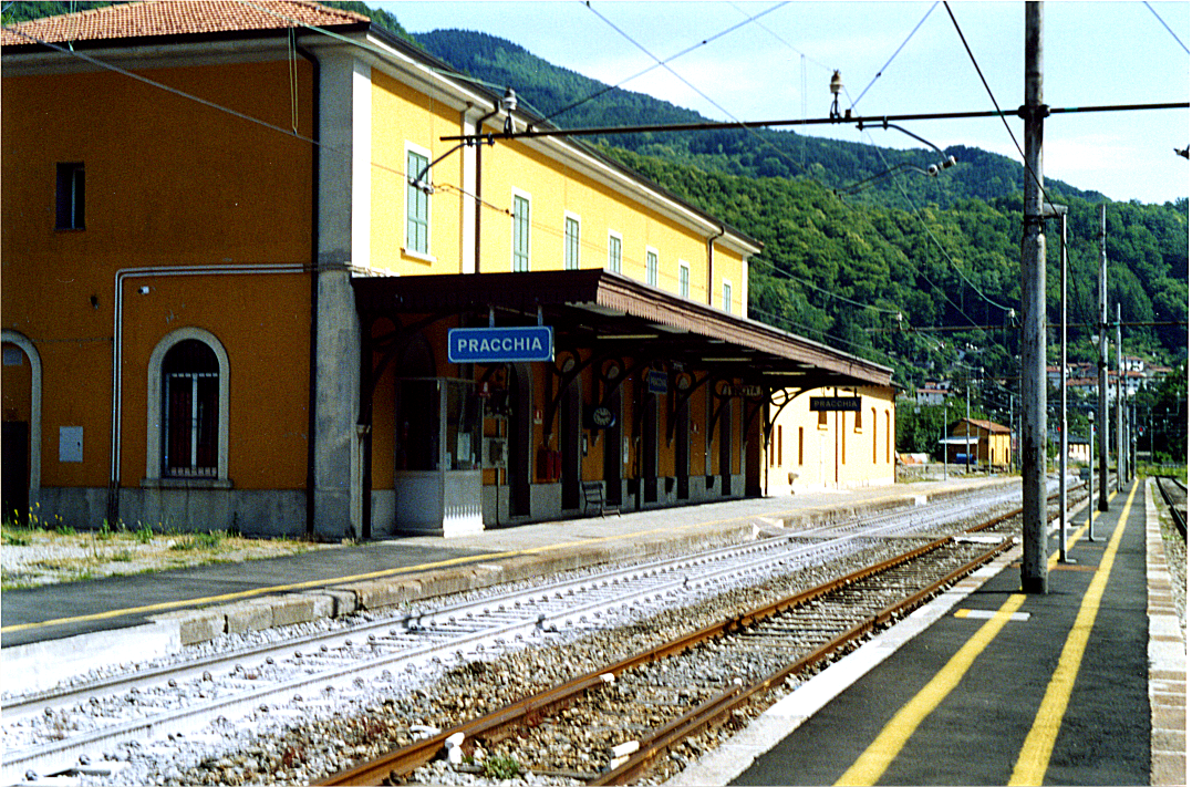 Veduta della stazione ferroviaria di Pracchia, lato binari, dal marciapiede fra i binari 2 e 3 prima del restauro del fabbricato avvenuto nel 2007. Mia foto con clone di Pentax reflex manuale, obiettivo focale fissa 50 mm su pellicola 400 ISO.